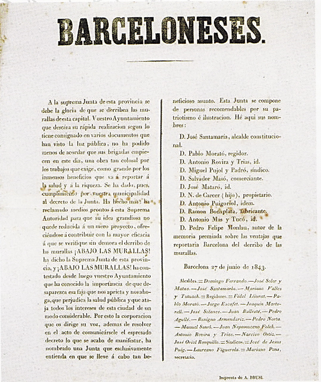 Ban publicat per l'Ajuntament de Barcelona amb motiu de la proposta d'enderrocament de la muralla medieval de la ciutat. (1843)